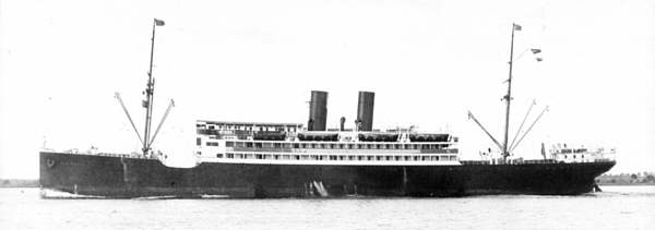 Der Passagierdampfer RIO BRAVO des NDL